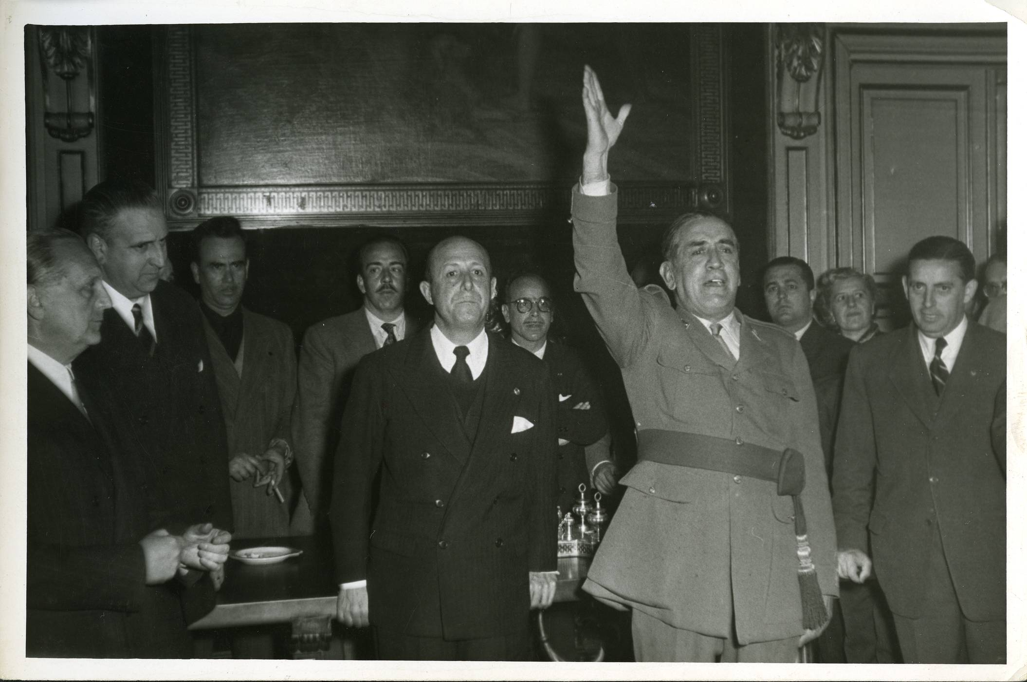 En el Ayuntamiento